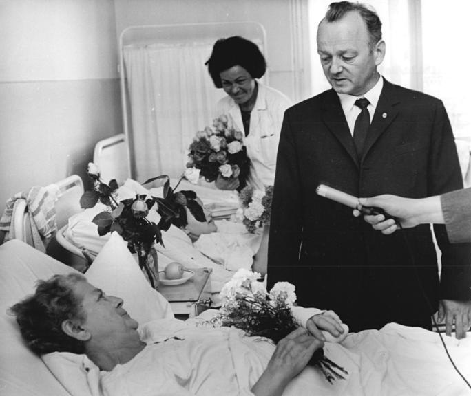 Zentralbild Reiche bgm 8.7.1967 Bezirk Magdeburg: Prof. Dr. Mecklinger bei den Verletzten des Verkehrsunglücks vom 6.7.1967 bei Langenweddingen Im Kreiskrankenhaus Bahrendorf informierte sich am 7.7.1967 der Stellvertreter des Ministers für Gesundheitswesen der DDR und Mitglied der eingesetzten Regierungskommission Prof. Dr. Mecklinger - hier am Krankenbett von Gertrud Koetz - über die Unterbringung, Betreuung und den Gesundheitszustand der vom tragischen Unglücksfall Betroffenen. "Wir sind hier in guten Händen! Uns wird von den Ärzten und Schwestern alle erdenkliche Hilfe zuteil." Das berichtete Frau Koetz dem MInister."